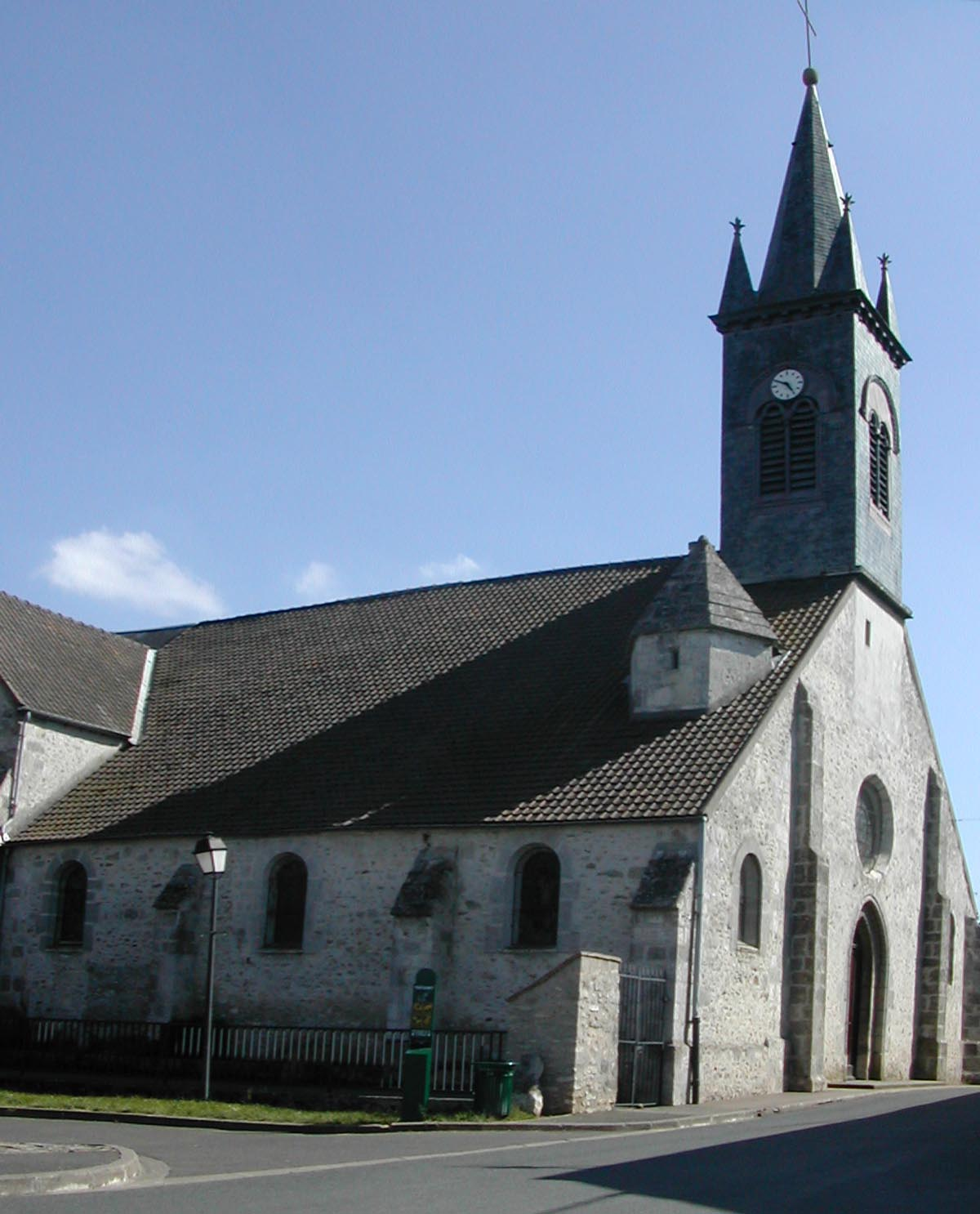 Eglise de Pussay